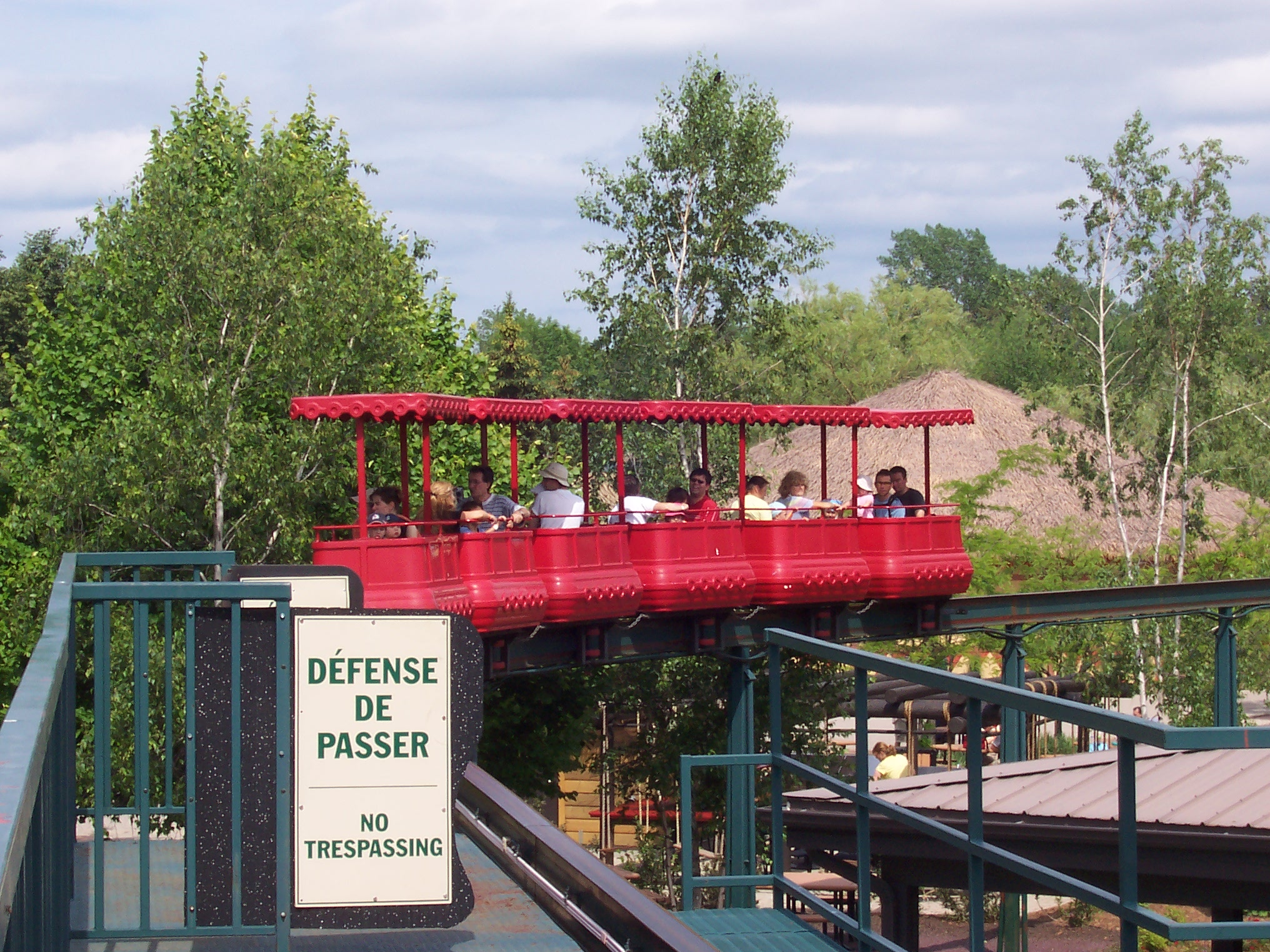 Zoo de Granby (Québec, Canada): Monorail; Granby Zoo (Quebec, Canada): Monorail